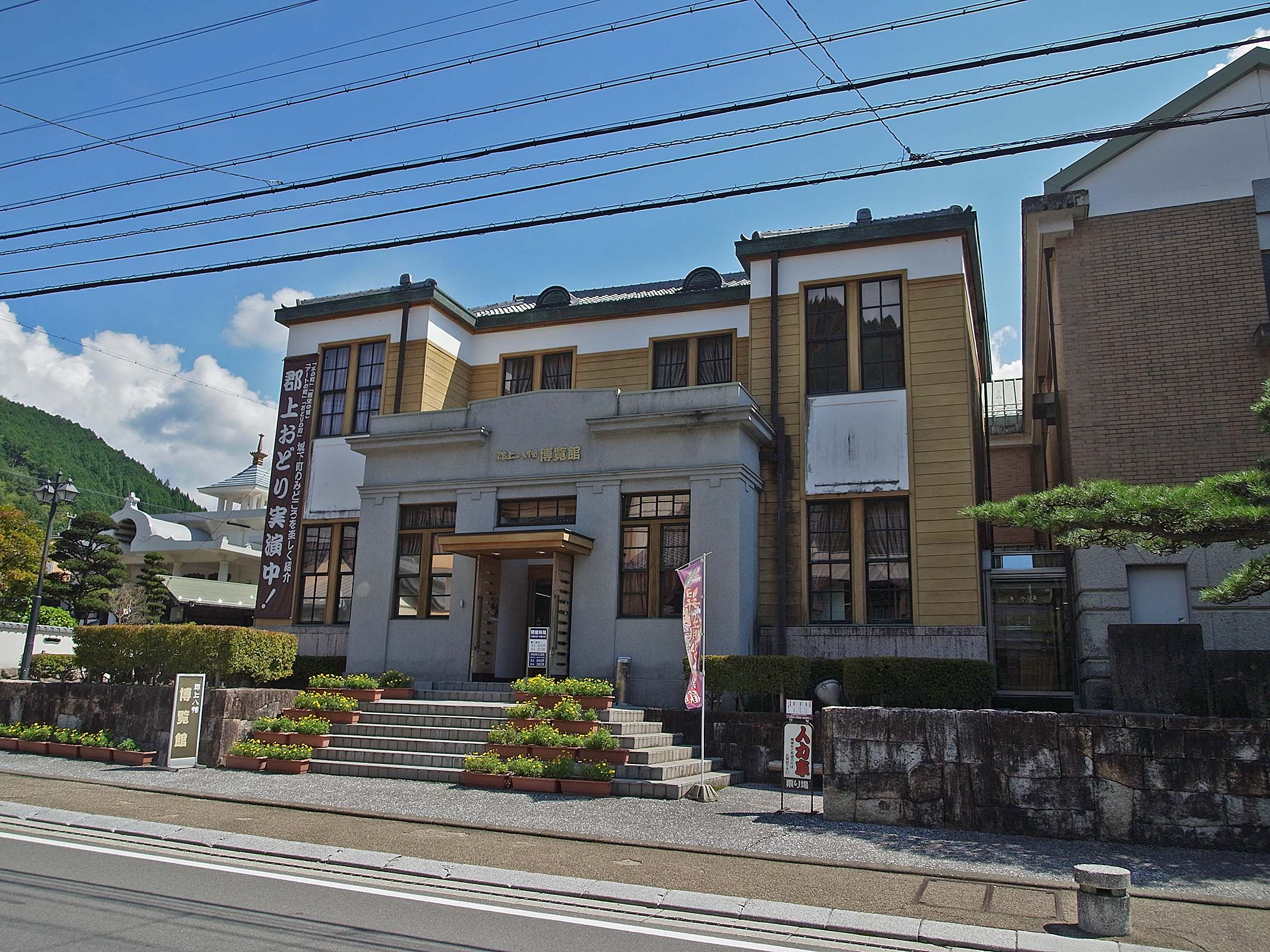 Gujo hachiman Hakurankan , 郡上八幡博覧館